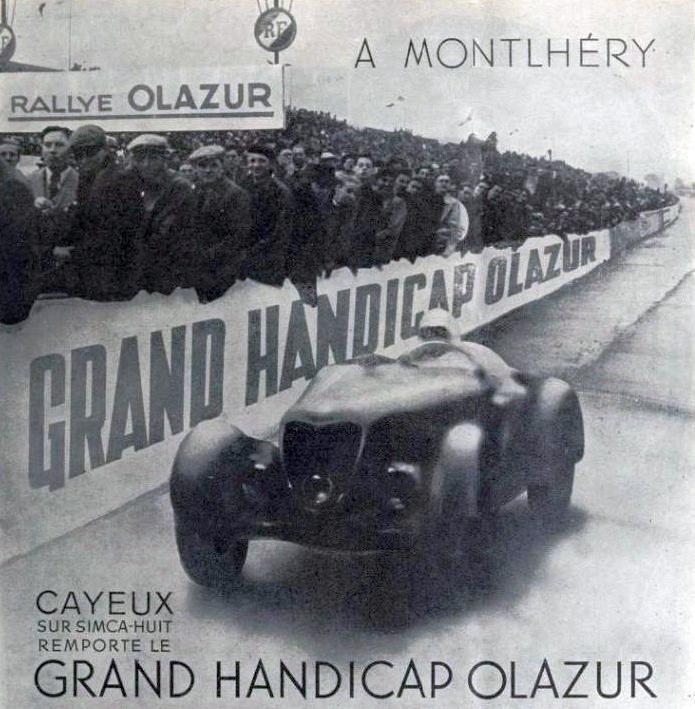 Grand Prix Handicap Olazur en mai 1939, victoire de Robert Cayeux sur Simca-8 ( à Montlhéry - par les huiles et carburants Olazur).